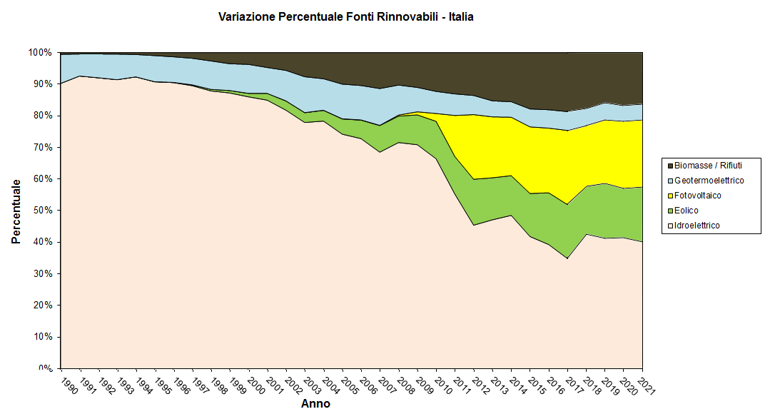 Riepilogo storico variazione percentuale produzione energia rinnovabile italiana.